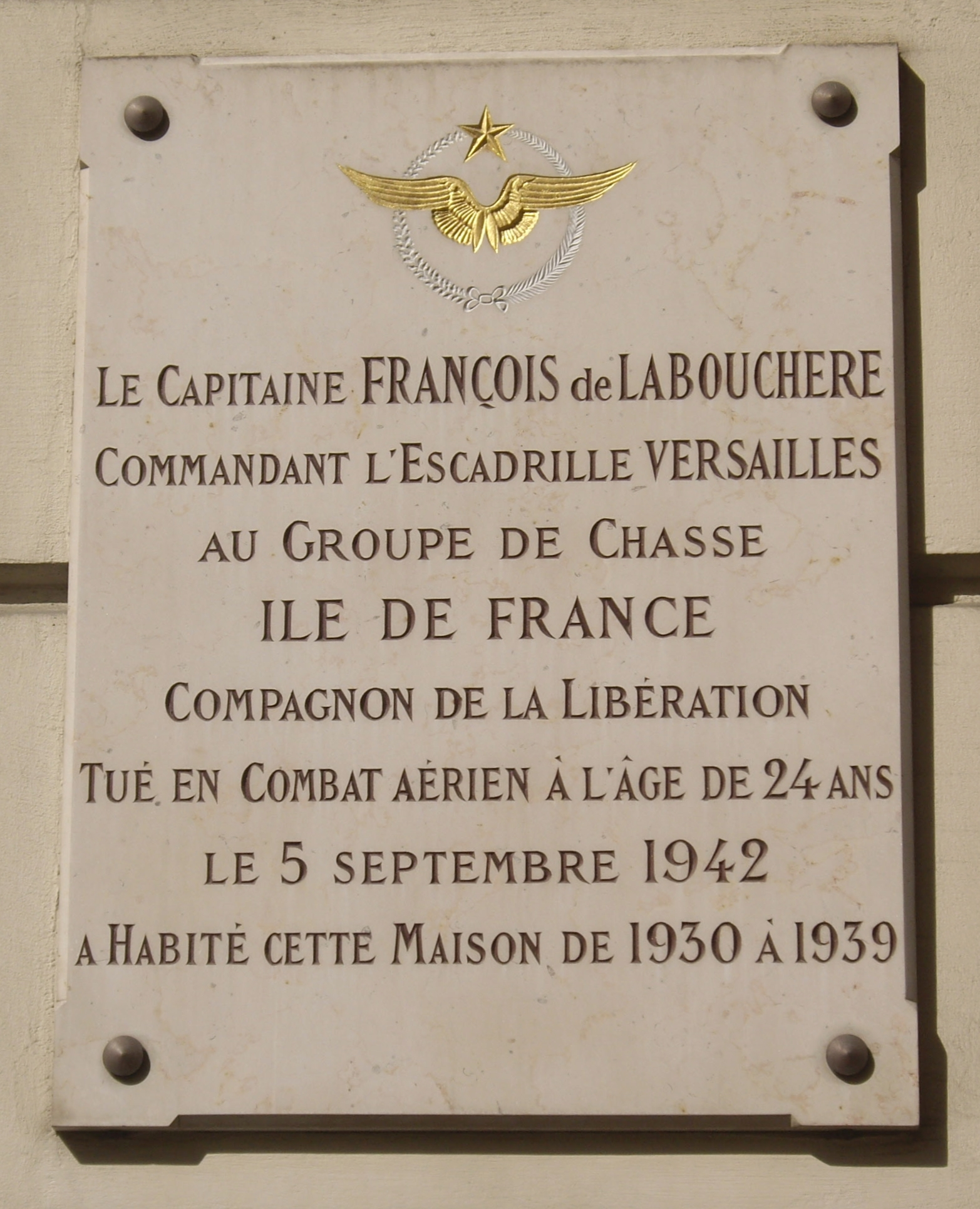 Plaque commémorative, 8 rue Guy-de-Maupassant, Paris 16e. « Le capitaine François de Labouchère, commandant l'escadrille Versailles au Groupe de chasse Île de France, Compagnon de la Libération, tué en combat aérien à l'âge de 24 ans le 5 septembre 1942, a habité cette maison de 1930 à 1939. »